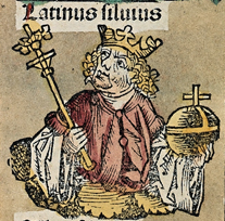 Зображення Латына Сільвія у Нюрнберзькій хрониці.